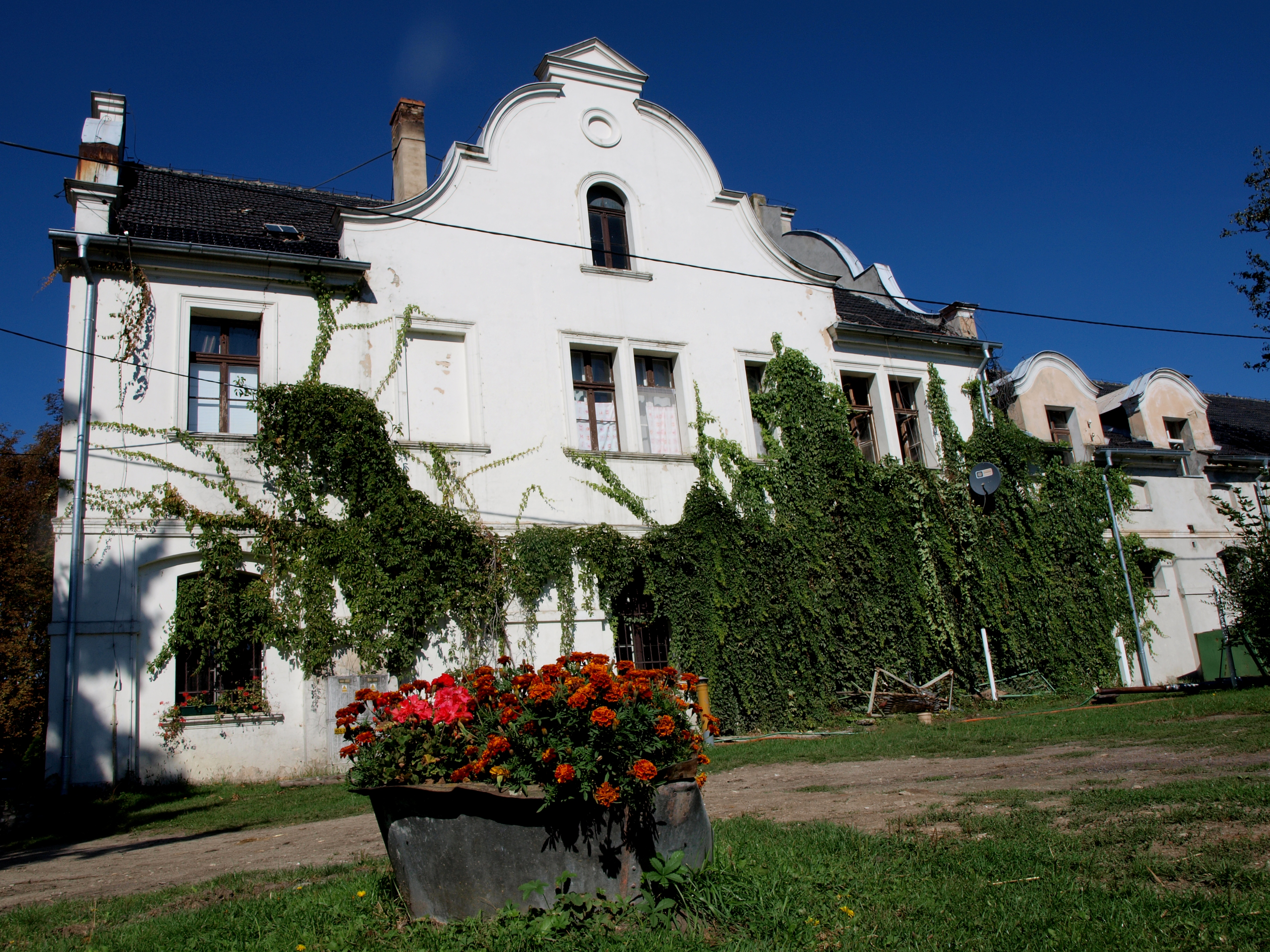 Moszna, stajnie, XIX/XX